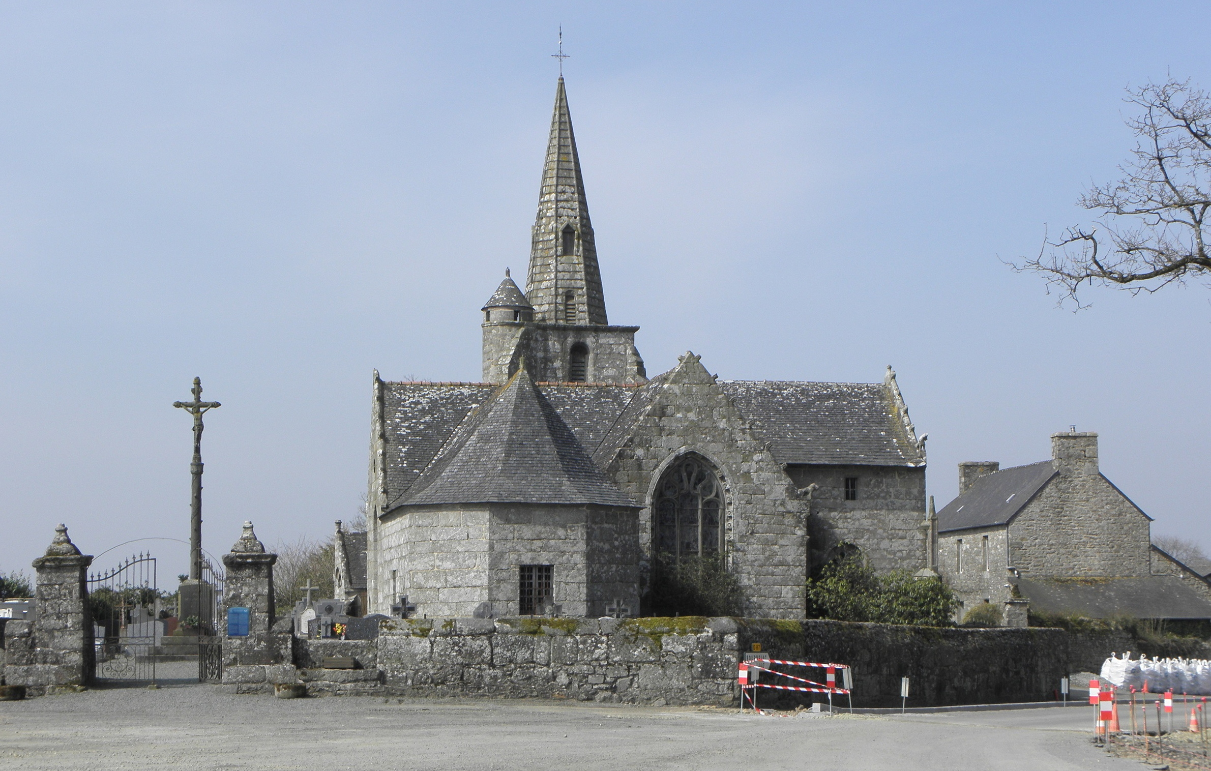 Chevet de l'église Saint-Gildas de Magoar (22).